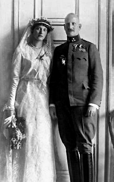 Mariage en 1921 d'Elisabeth Fürstin von Urach, Gräfin von Württemberg (1894-1962), fille Wilhelm Karl duc von Urach (1864-1928) et d'Amalie Marie née duchesse en Bavière (1865-1912) et du prince Karl Aloys von und zu Liechtenstein (1878-1955), fils du prince Alfred (1842-1907) et de la princesse Henriette von und zu Liechtenstein (1843-1931). La princesse et son père ont refusé en 1913 la demande en mariage du prince Joachim de Prusse (1890-1920), fils de l'empereur Guillaume II, car il était protestant.